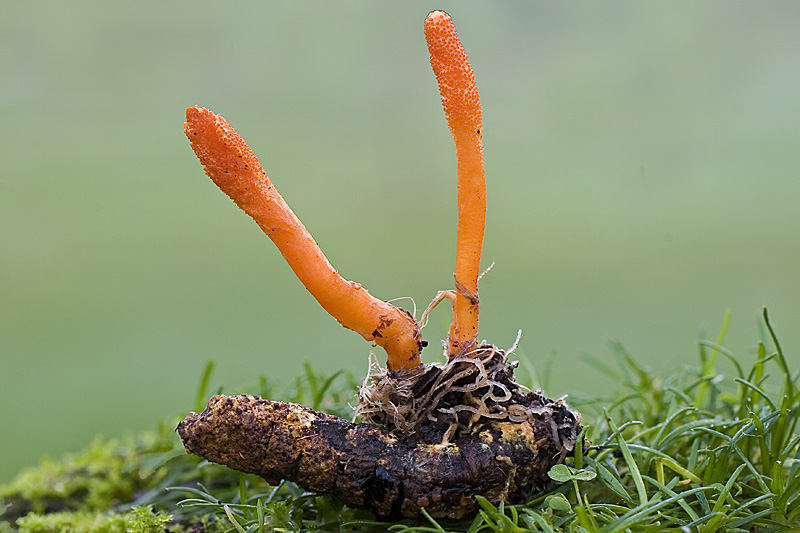 El Cordyceps militaris parasita la procesionaria del pino (Thaumetopoea pytiocampa), En las tardes del verano emergen la mariposas del suelo para reproducirse y poner los huevos en las acículas de los pinos, al cabo de un mes nacen las orugas y se alimentan de las hojas se hacen adultas, bajan de los pinos para enterrarse en el claro del bosque, es aquí cuando las esporas del hongo se pegan a los pelos del cuerpo y se entierran con ella, después las esporas germinan y acaban con las crisálidas de la procesionaria. Al ver los hongos y desenterrarlos aparece el cuerpo de la oruga parasitado por el hongo tal como aparece en la foto. Mas setas y hongos